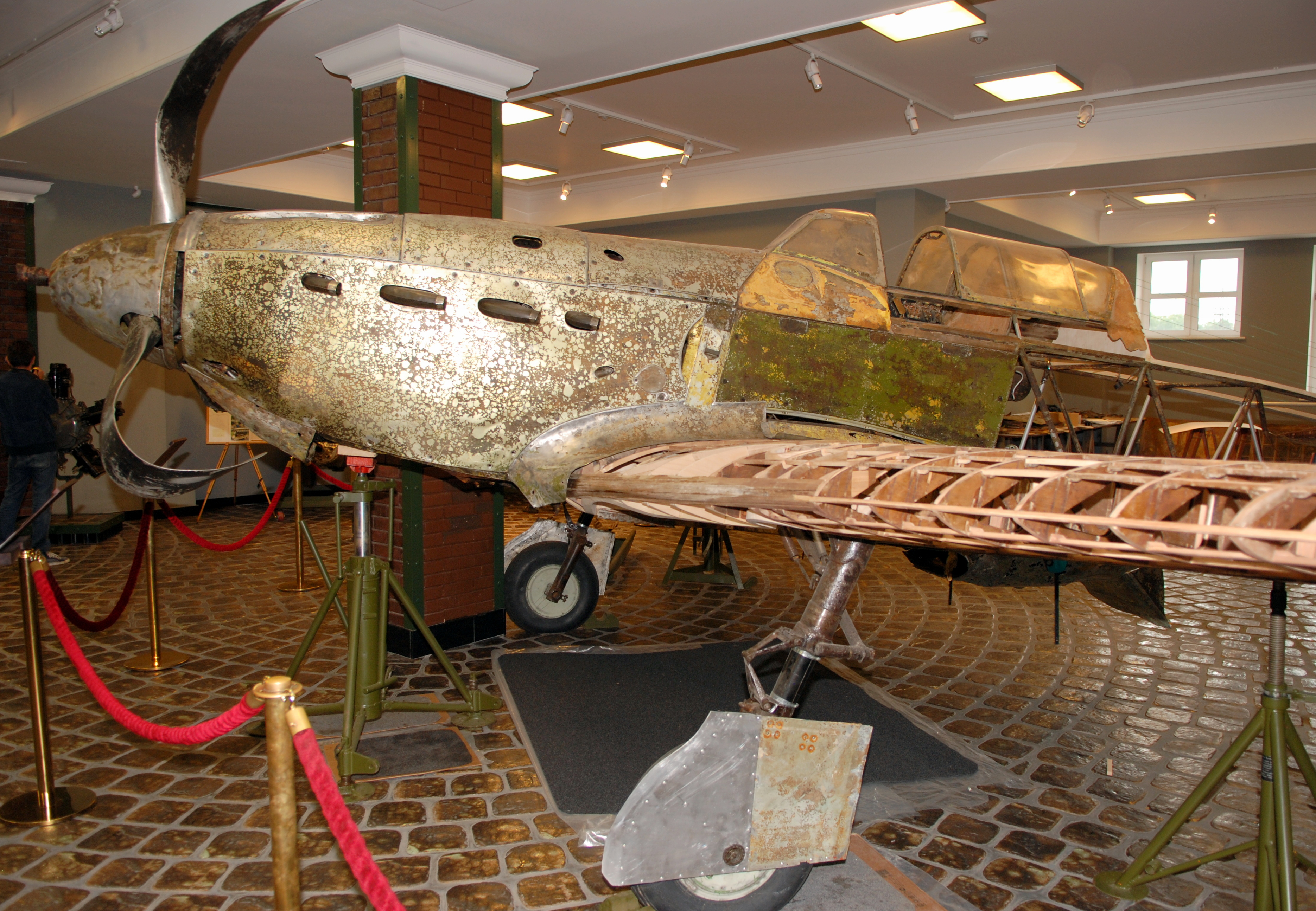 Jakowlew Jak-1